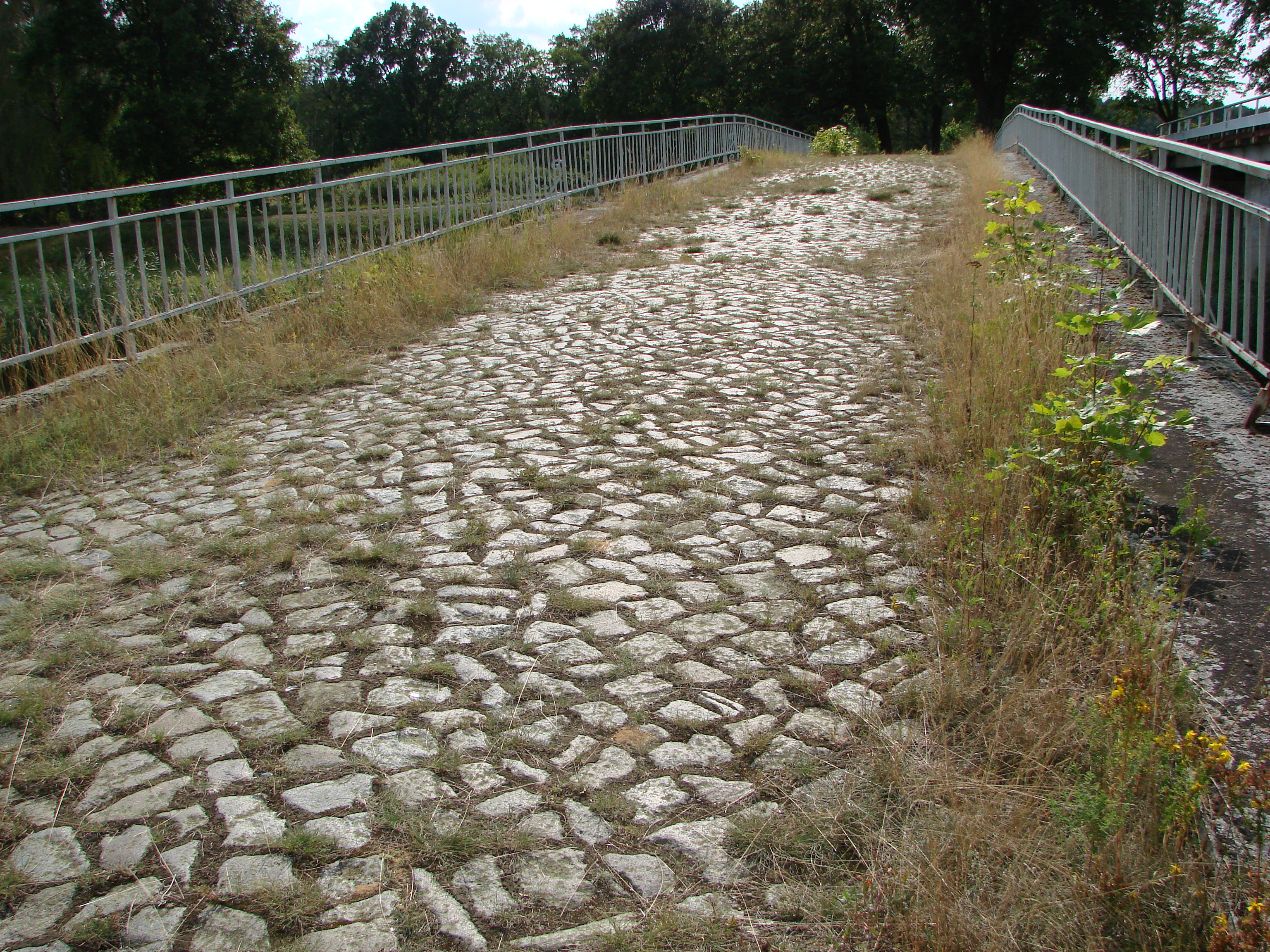 1905 fertiggestellt, unbewehrter Stampfbeton, Fahrbahnbelag aus Lesesteinen